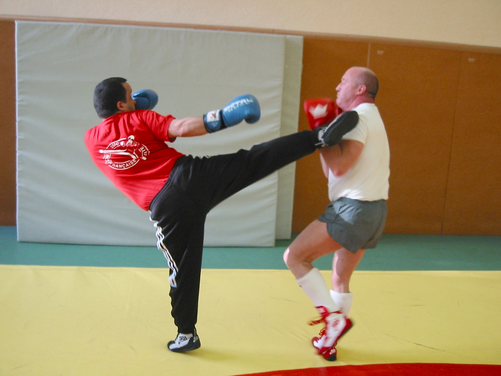 Boxe Française. Le fouetté-figure.